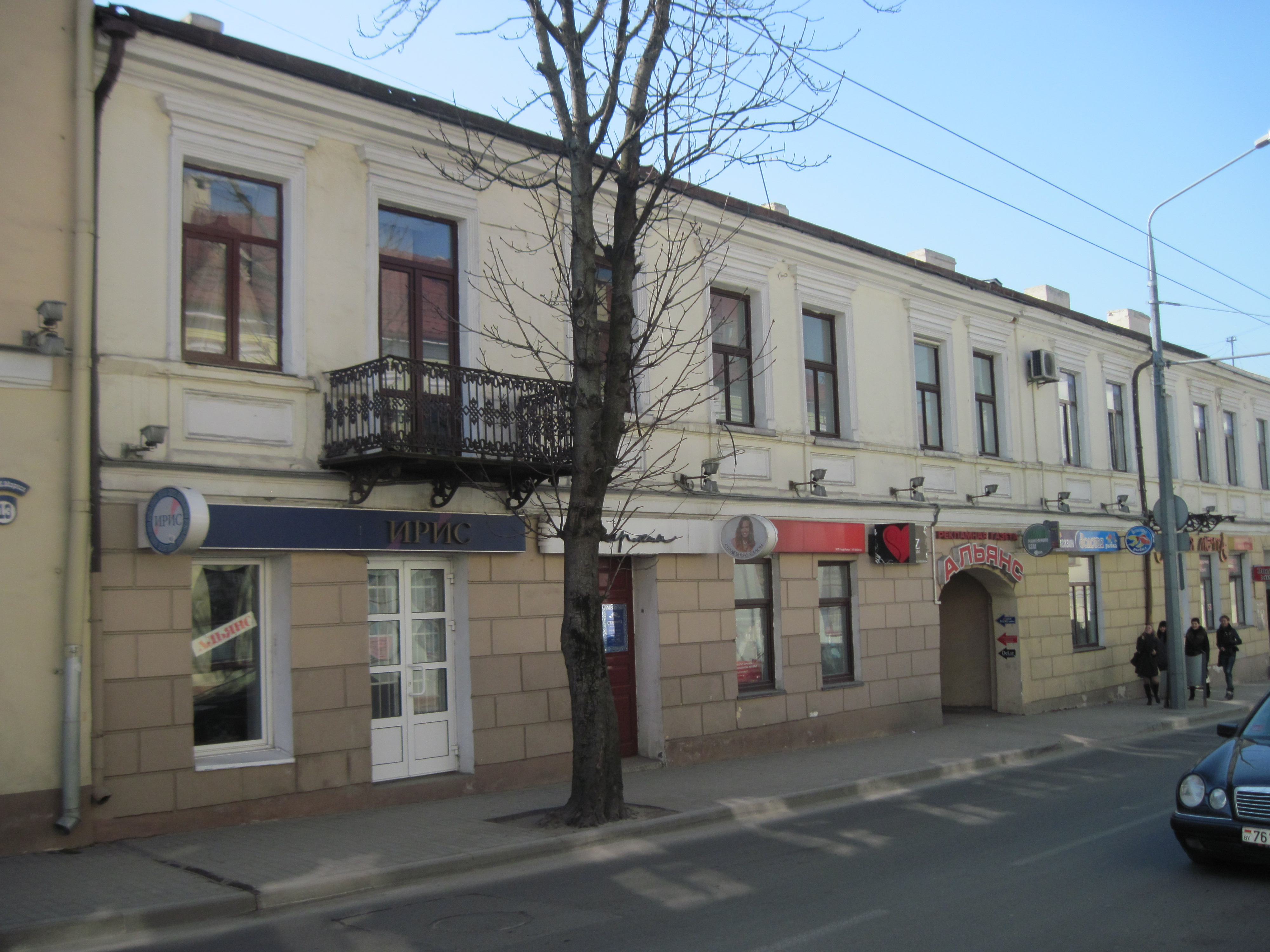 Забудова гістарычнага цэнтра Гродна. Вуліца К. Маркса, 11.